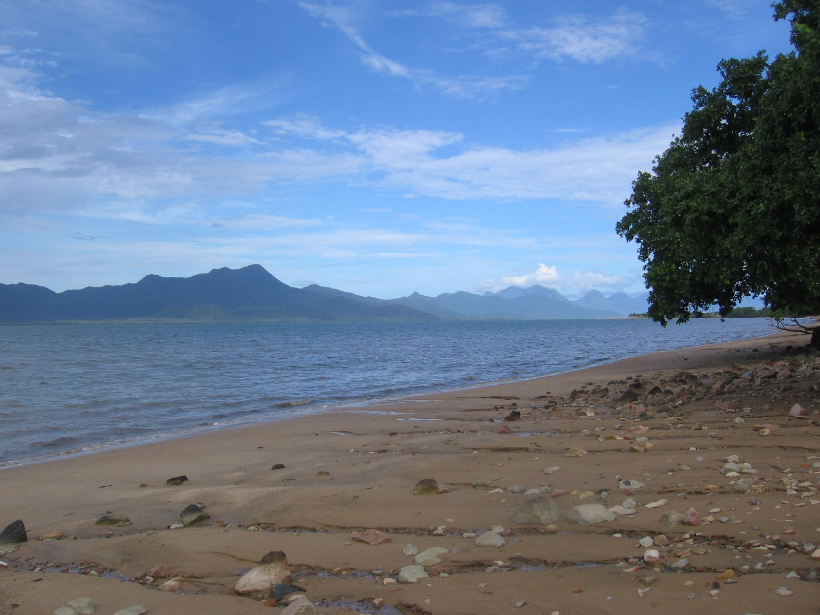 Plage De Cardwell, Queensland, Australie et Hinchinbrook Island